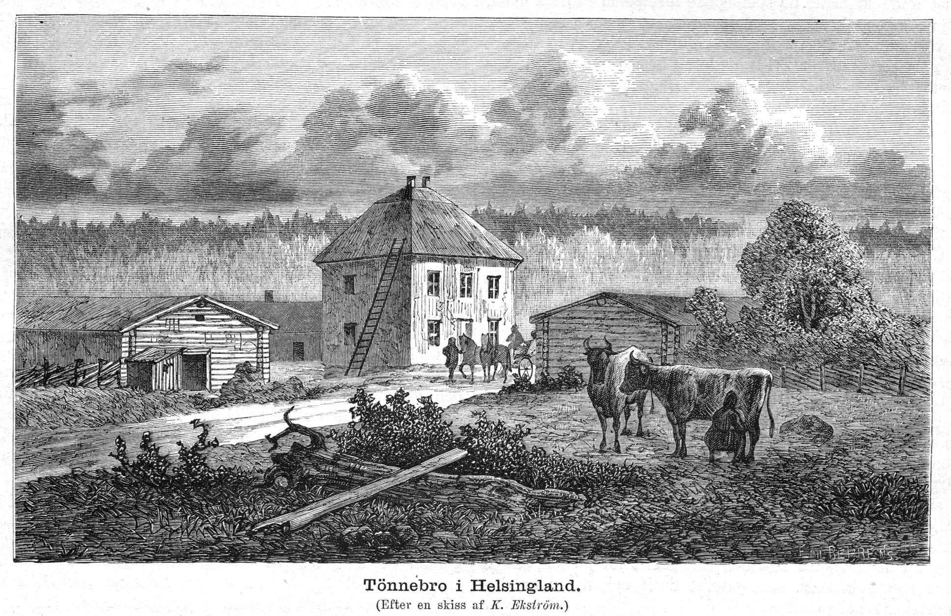 Raststugan i Tönnebro Hälsingland (efter en skiss av K. Ekström) i Svenska Familj-Journalen 1876.